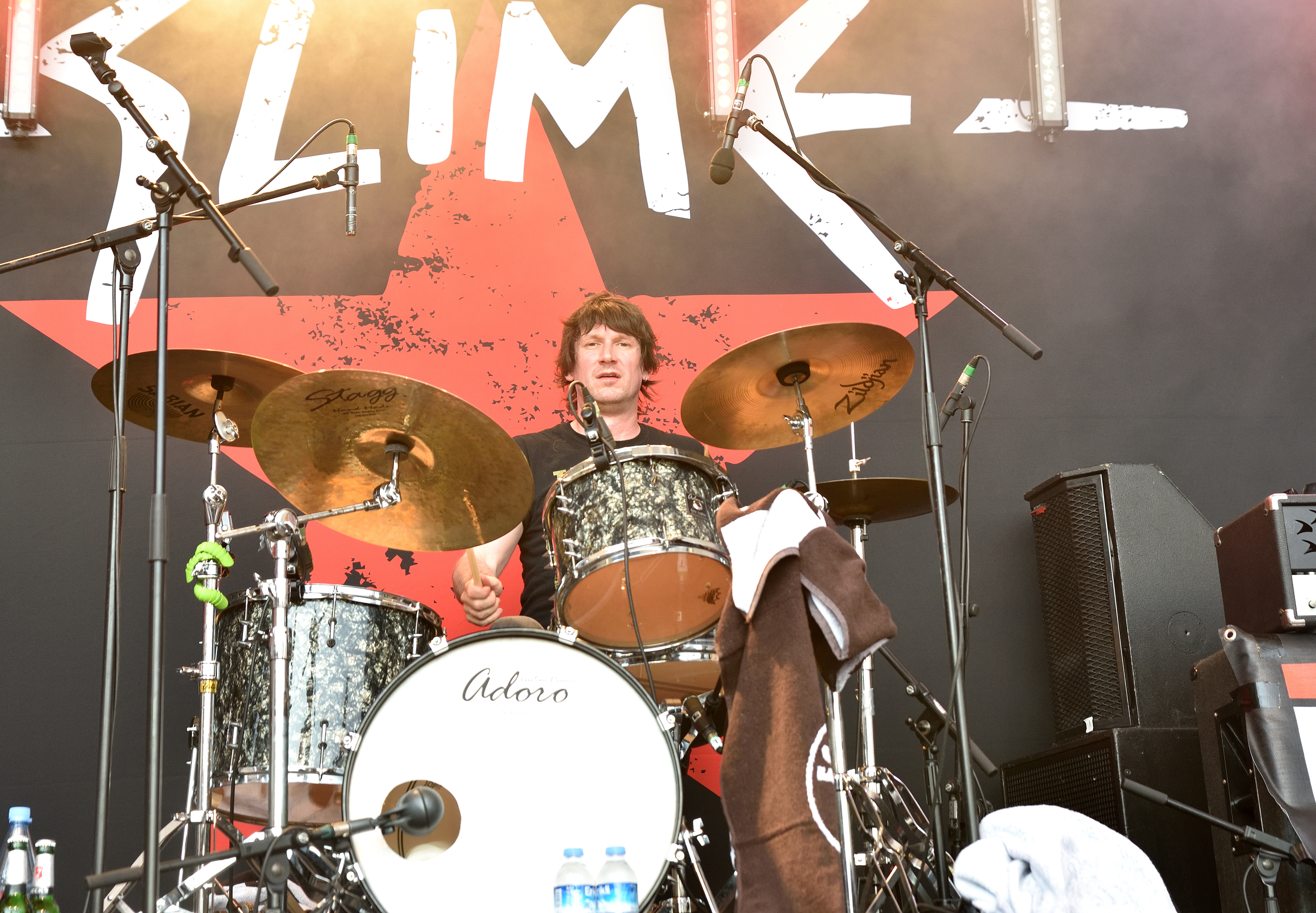 Slime beim Hafen Rock 2016 in Hamburg